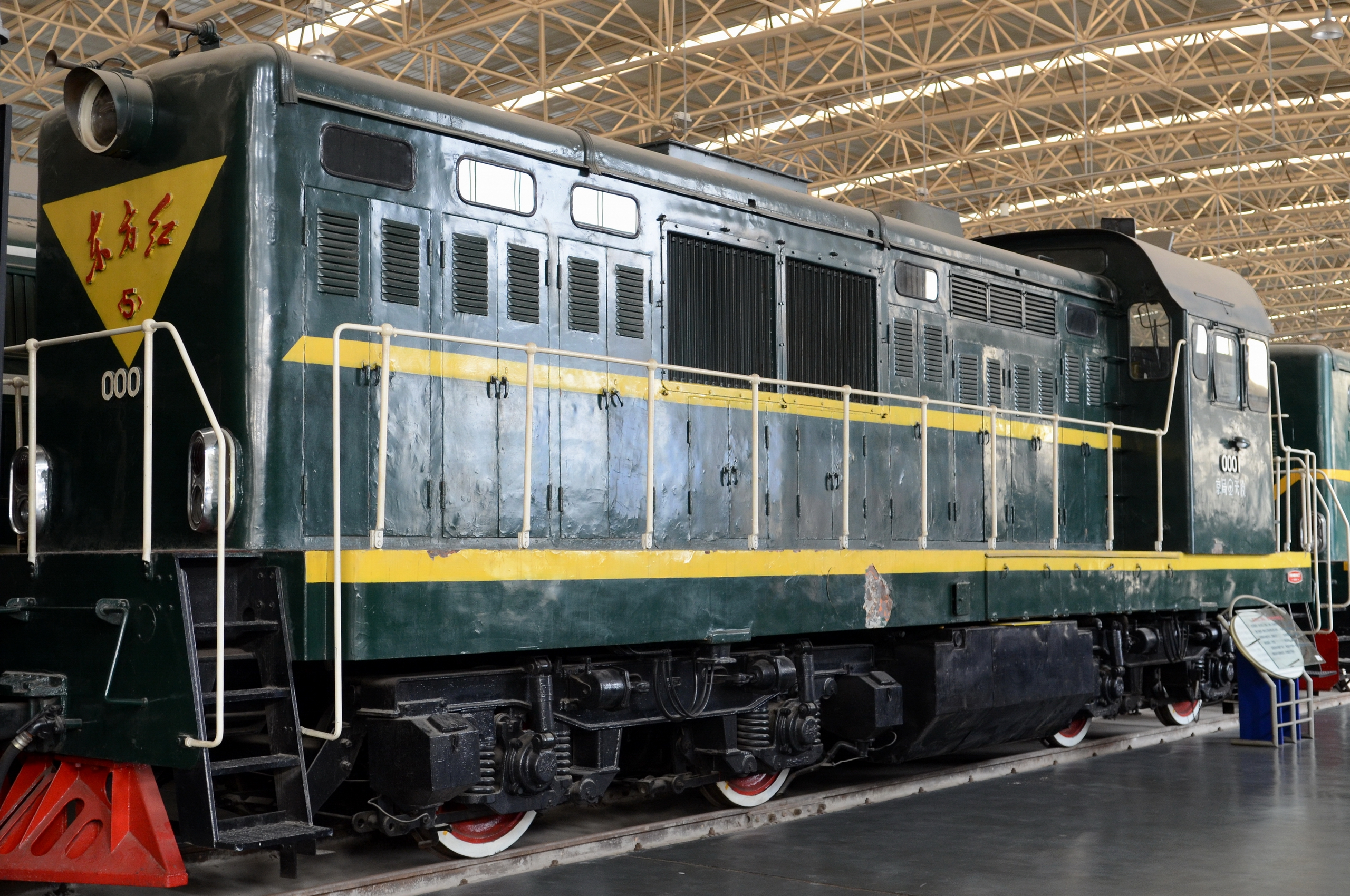 东方红5型 0001号车保存在中国铁道博物馆